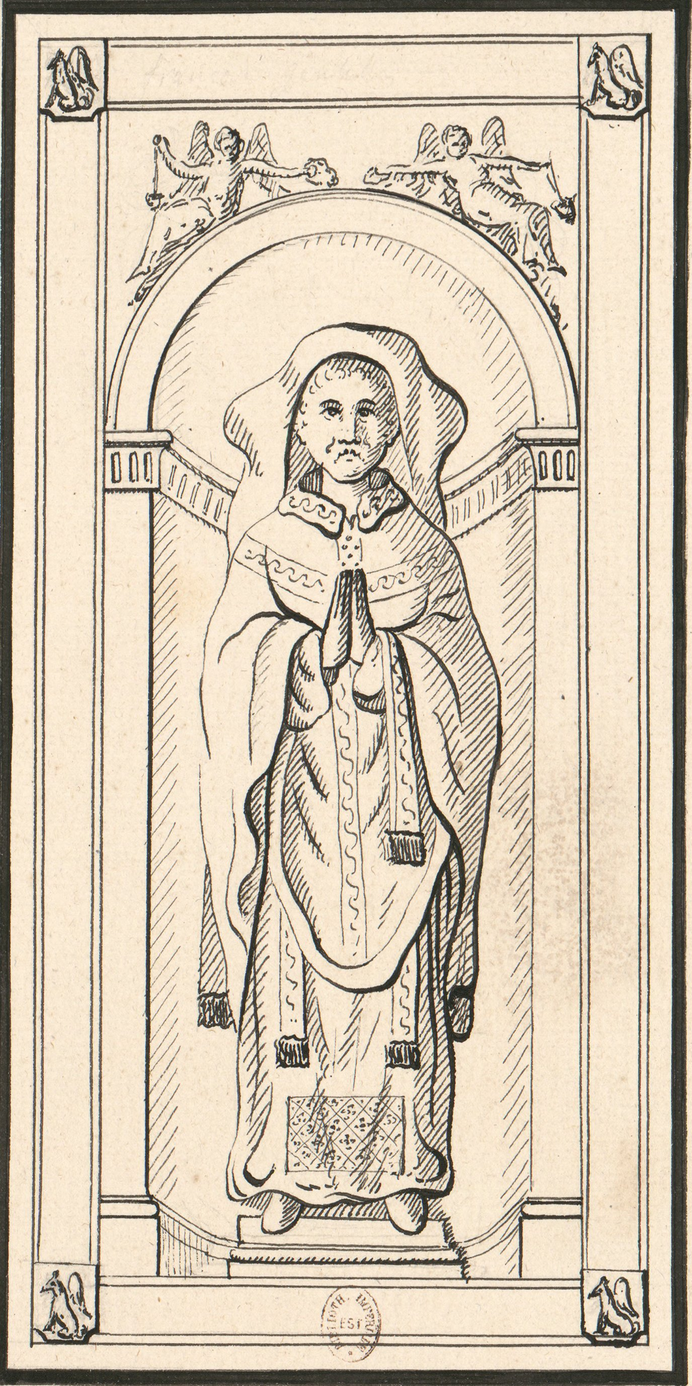 Pierre tombale de Claude Cottereau sur laquelle est gravée l'effigie d'un chanoine